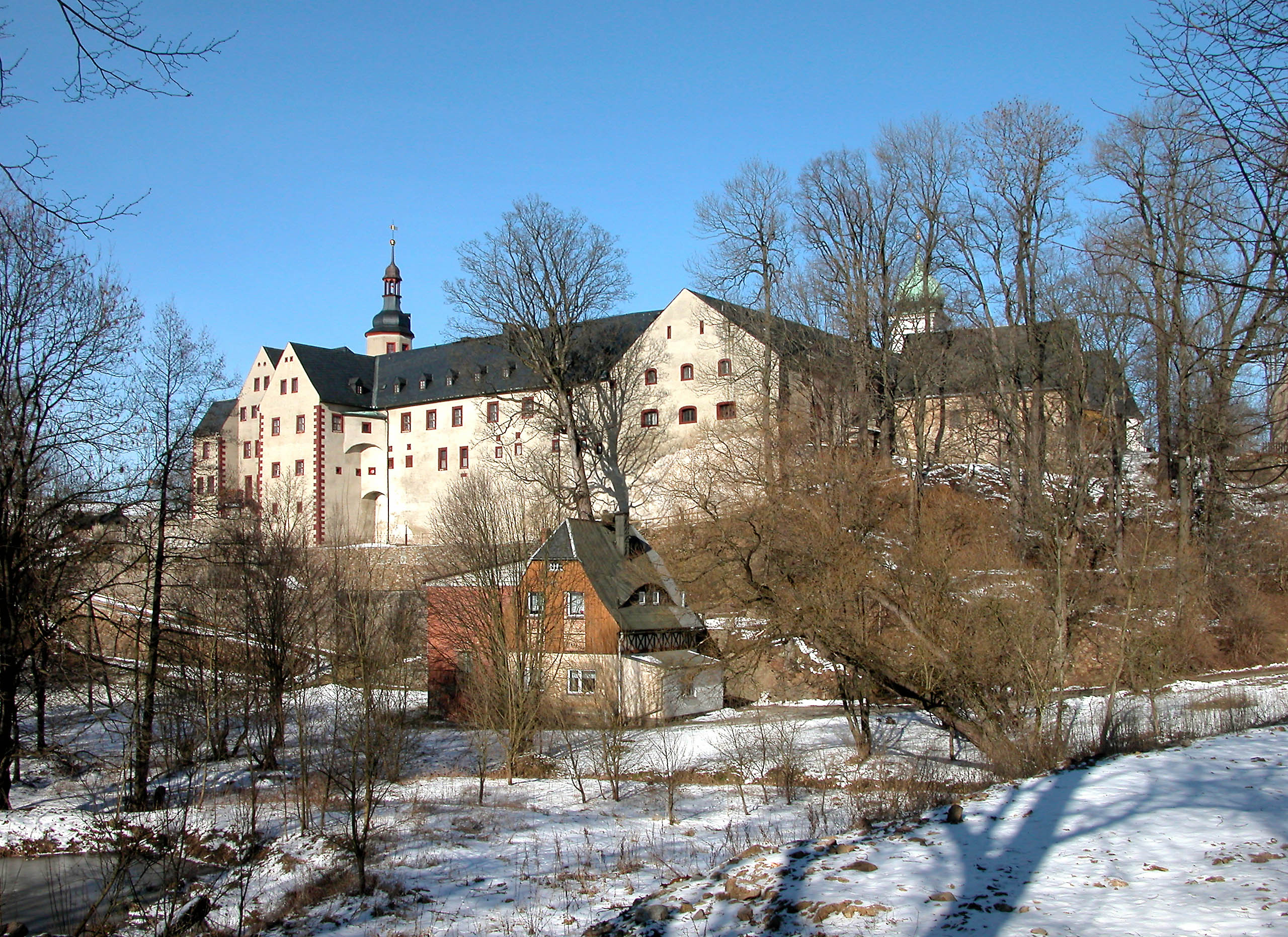 21.02.2004 09526 Pfaffroda, Am Schloßberg 8 (GMP: 50.696189,13.353422): Schloß, heutiger Bau von 1573-1578. Derzeit Seniorenheim. Sicht von Südosten. [DSCN2433.TIF]20040221200.JPG(c)Blobelt